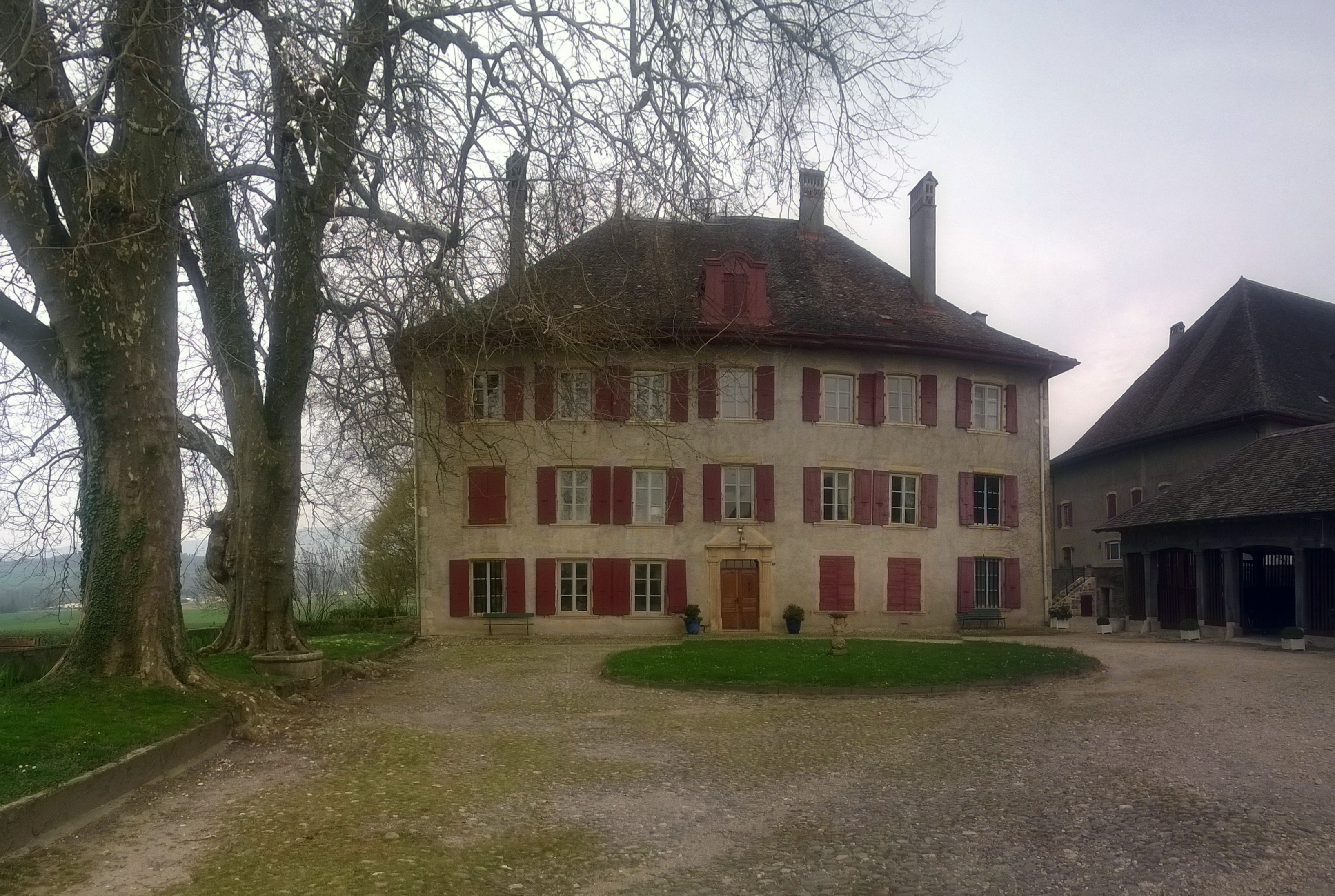 Seigneurie d'Eclépens, Éclépens, Totale